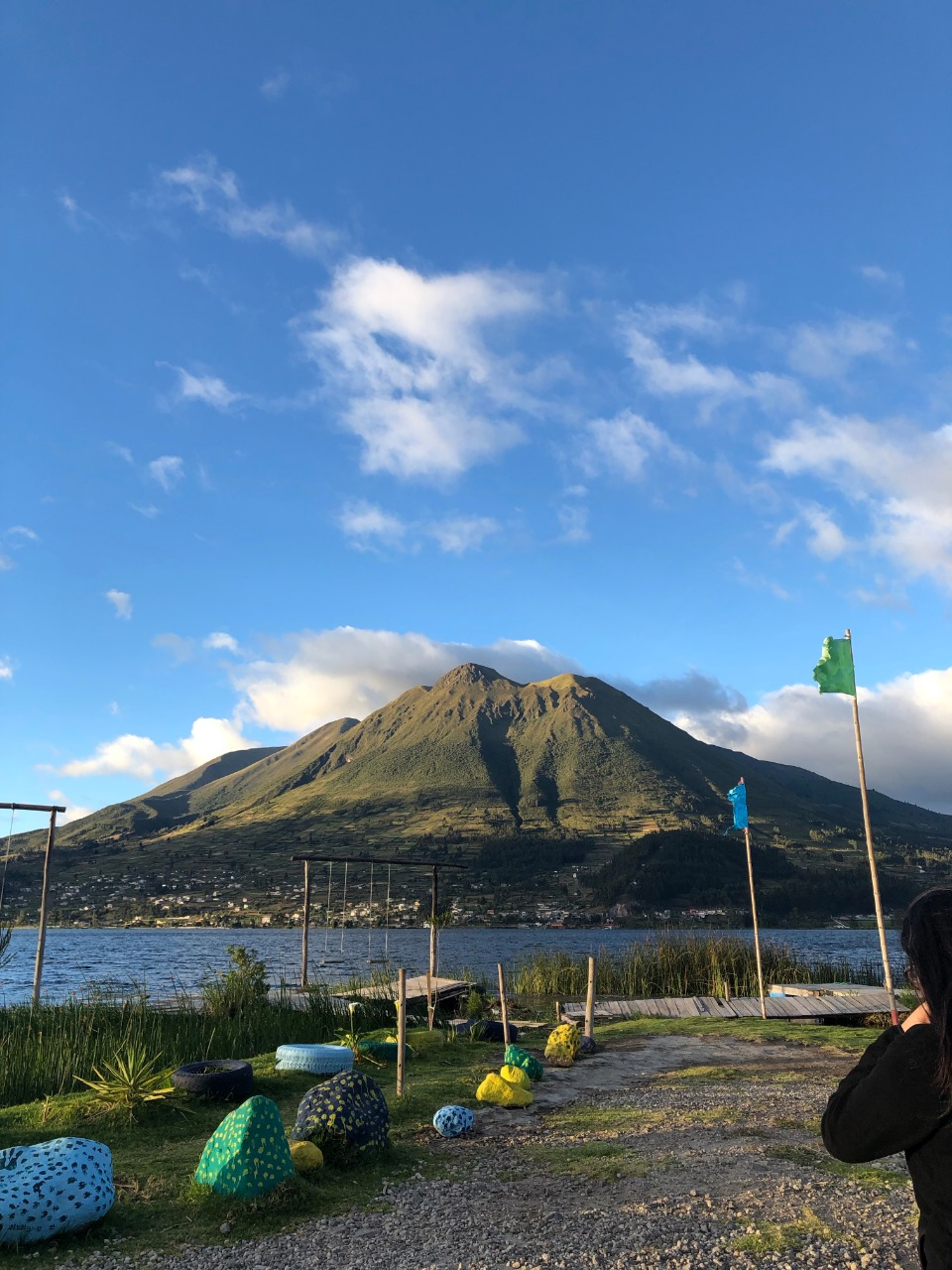 es una paisaje de una tarde de sol en las faldas del Imbabura en Ecuador